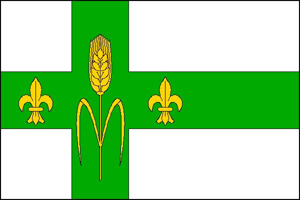 Vlajka obce Pamětice